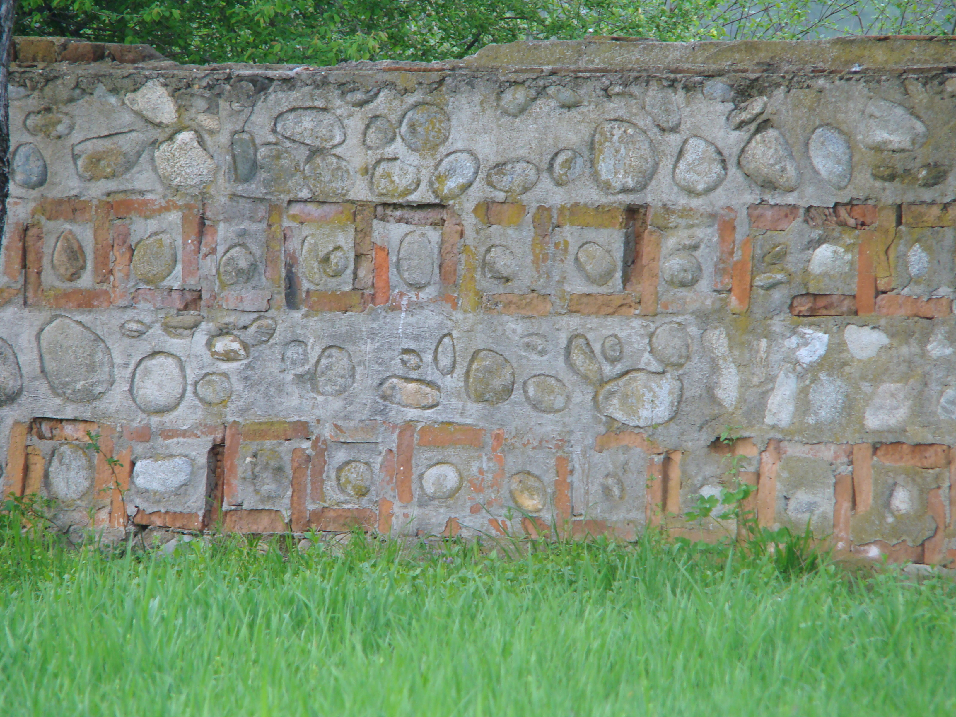 Ansamblul curții lui Cornea Brăiloiu, municipiul Târgu Jiu, str. Dumbrava 35